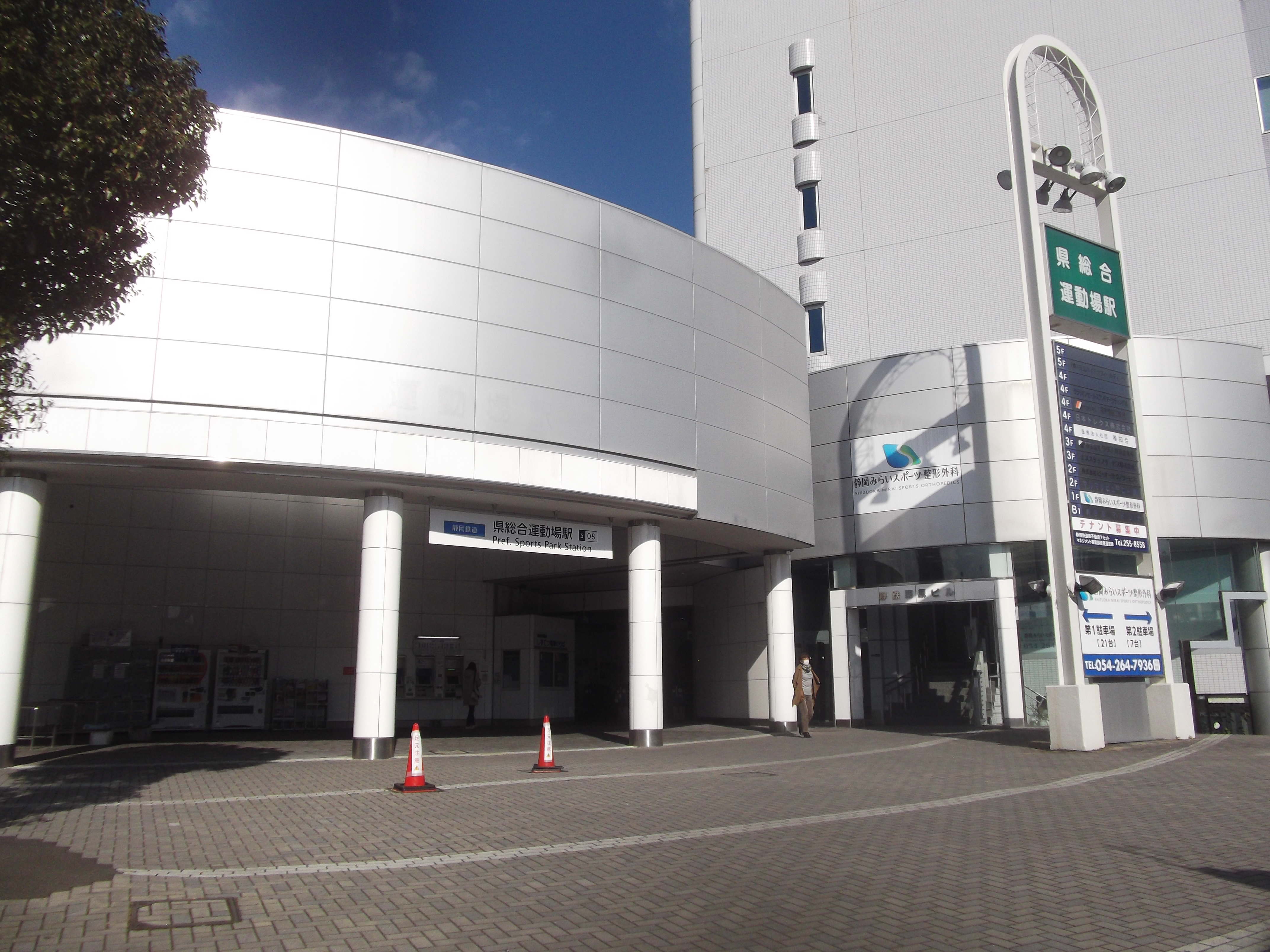 静岡鉄道の県総合運動場駅。